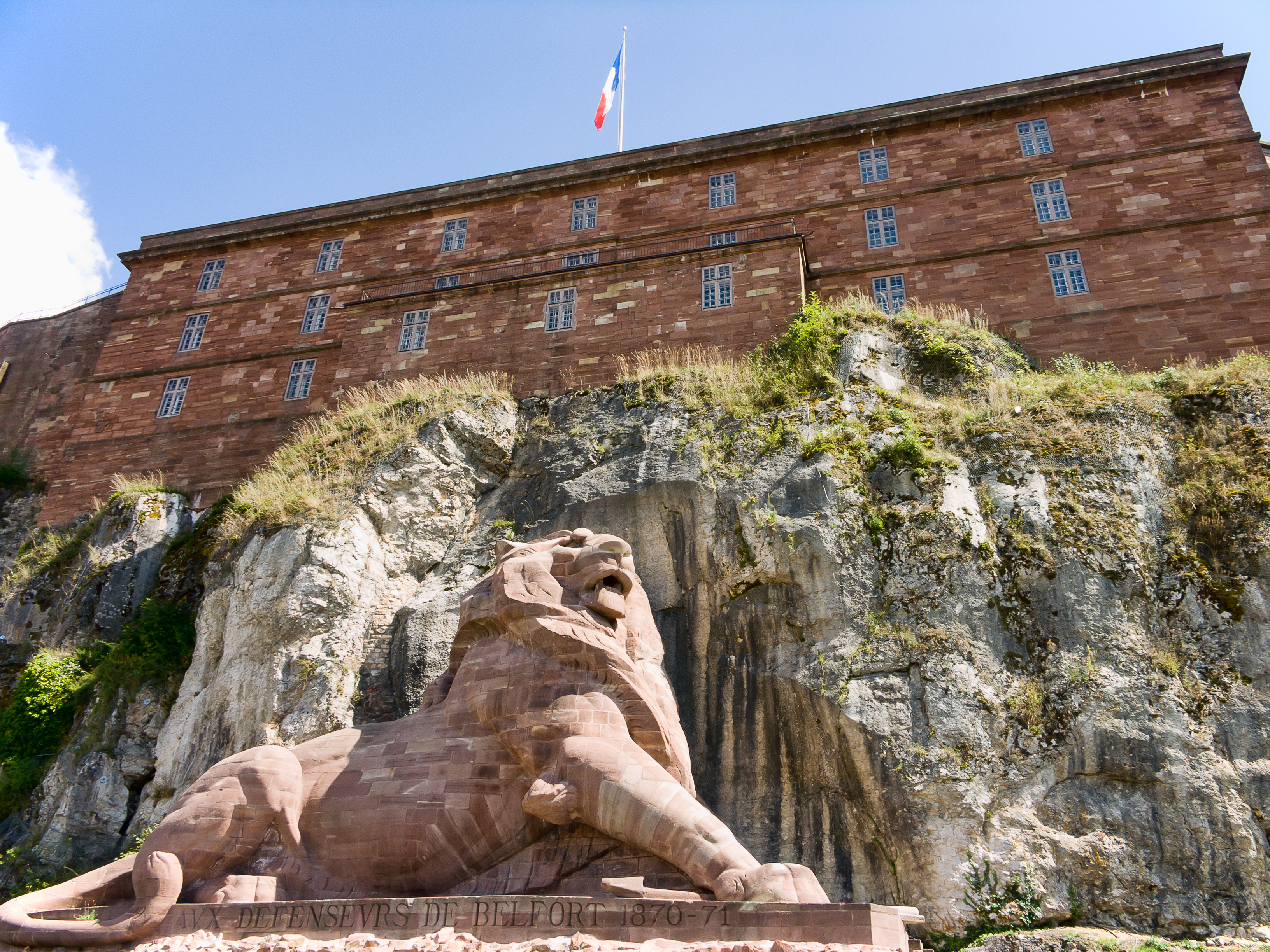 Lion de Belfort et château le surplombant.